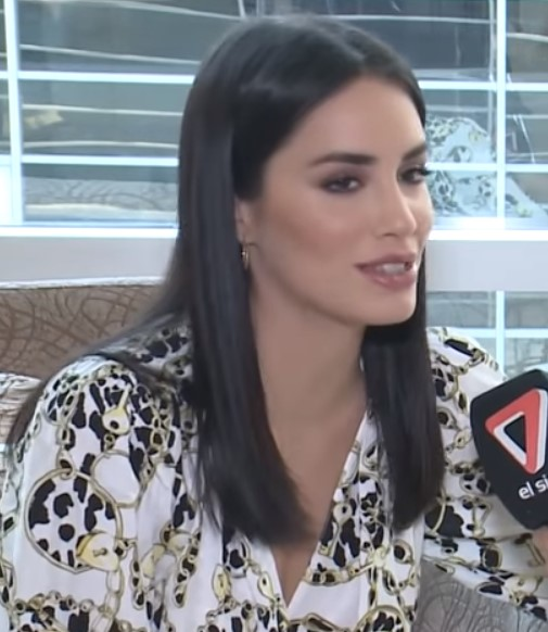 Lali en entrevista para El Siete TV en 2018